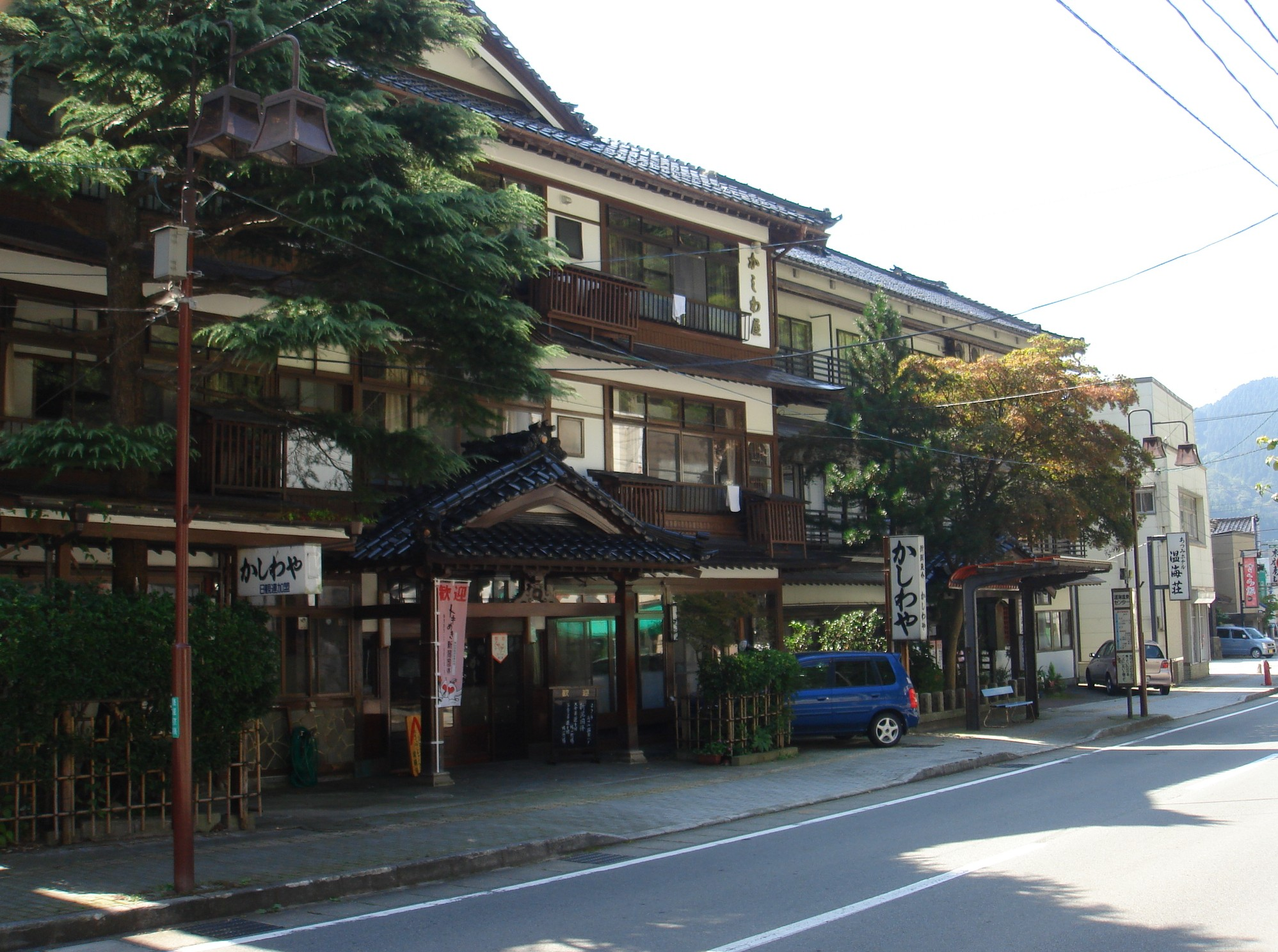 あつみ温泉の老舗旅館